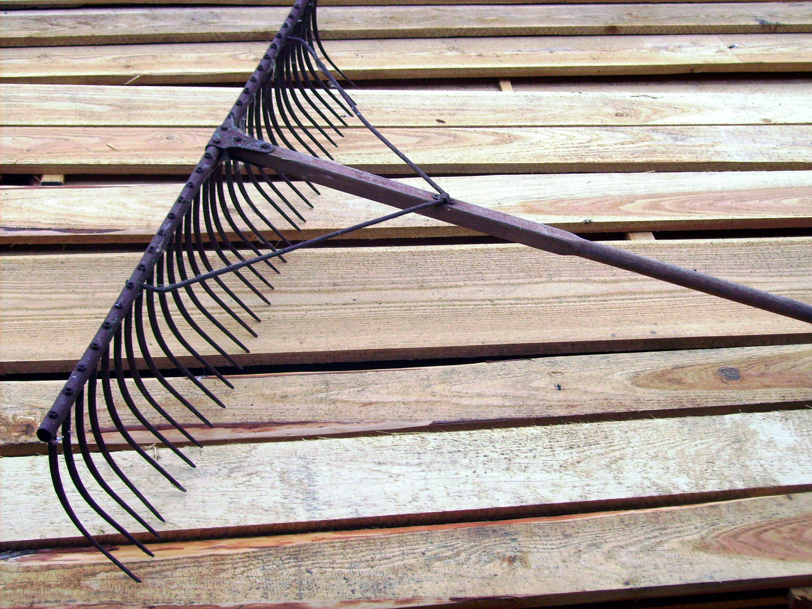 Ein Ährenrechen. Historisches Werkzeug und landwirtschaftliches Gerät